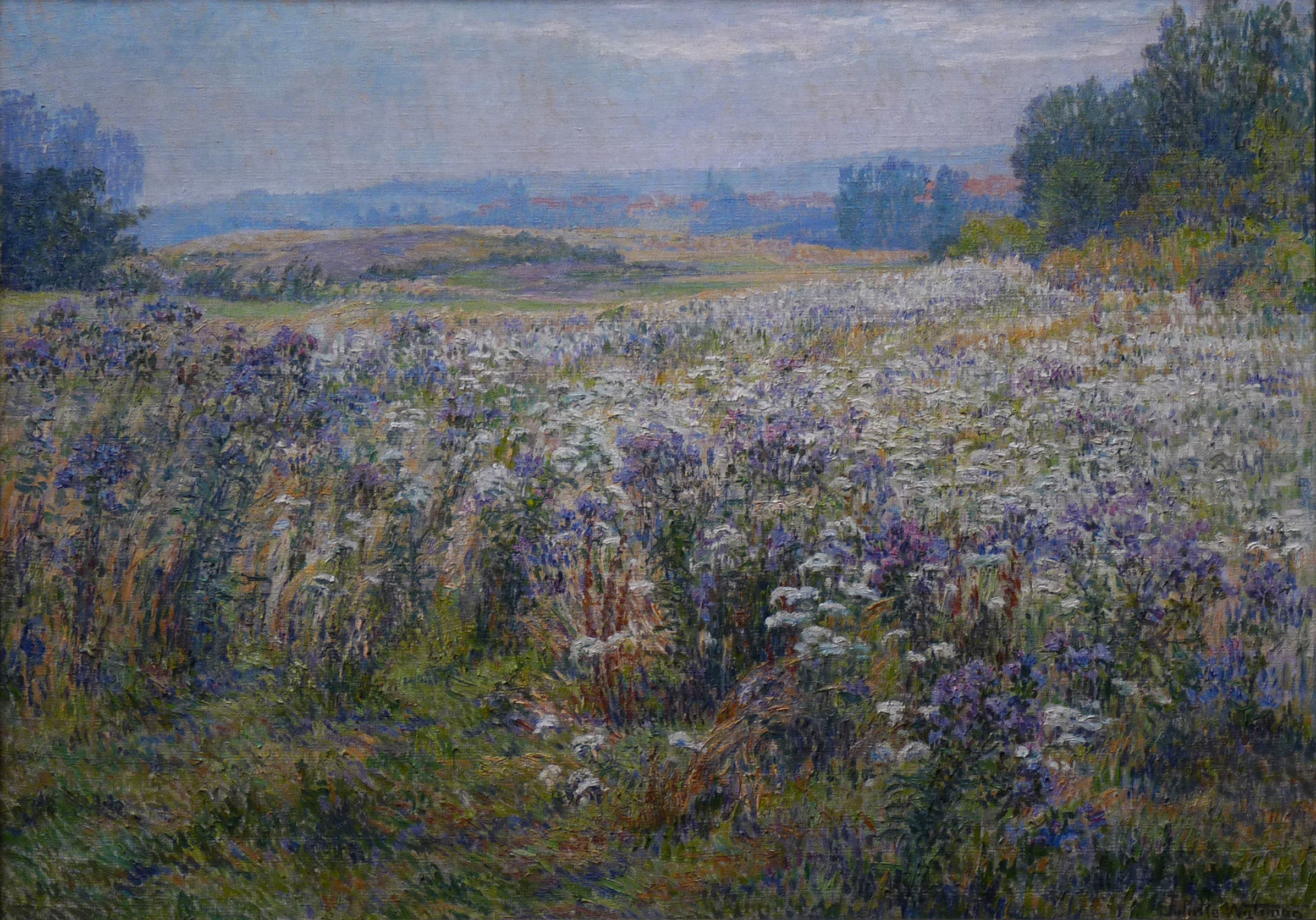 Juliette Wytsman, Paysage à St Job (environs de St Job), 112 x 79 cm, oil on canvas Le plateau du Kauwberg et au loin le hameau de St Job